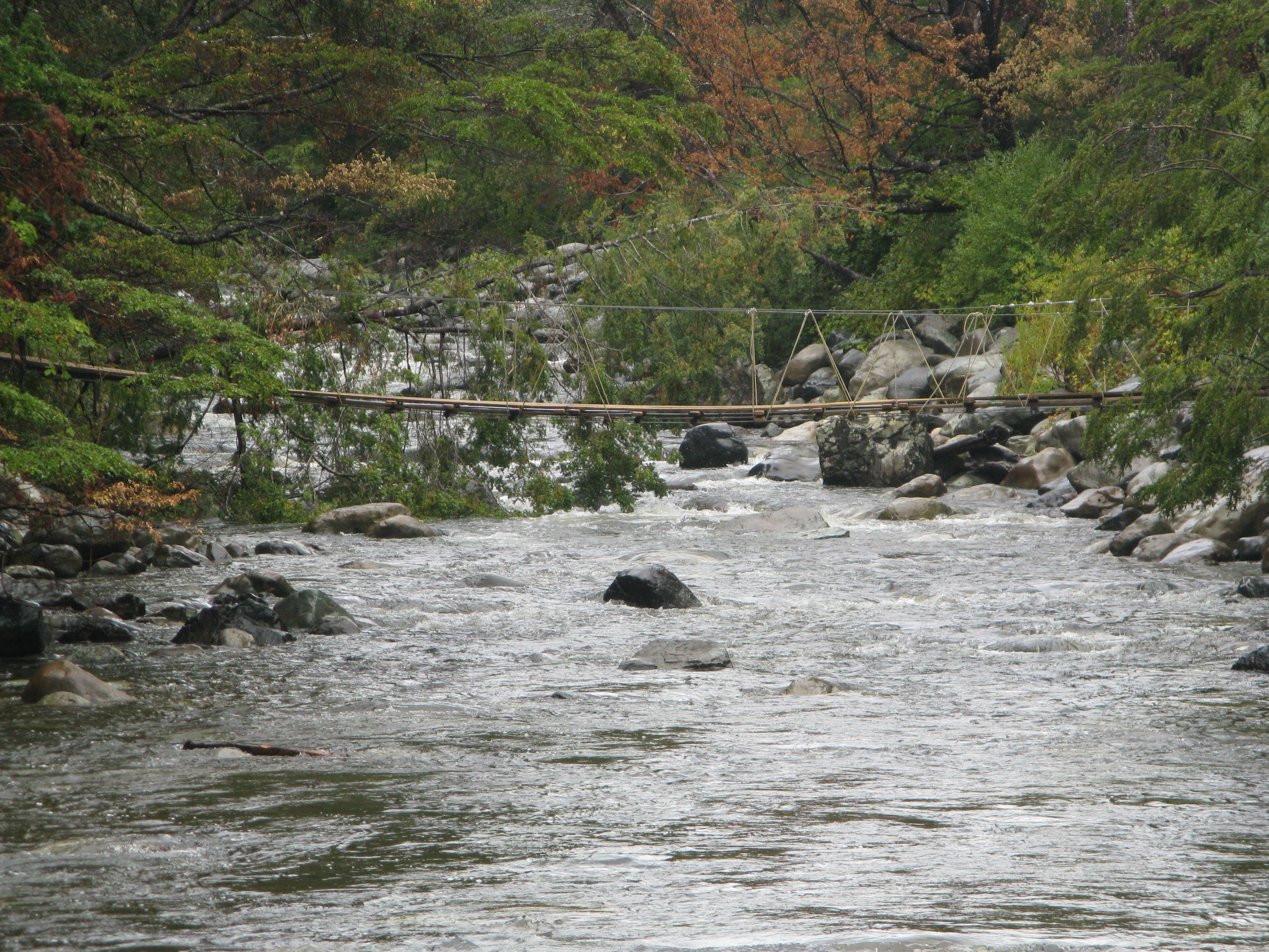 Puente Colgante